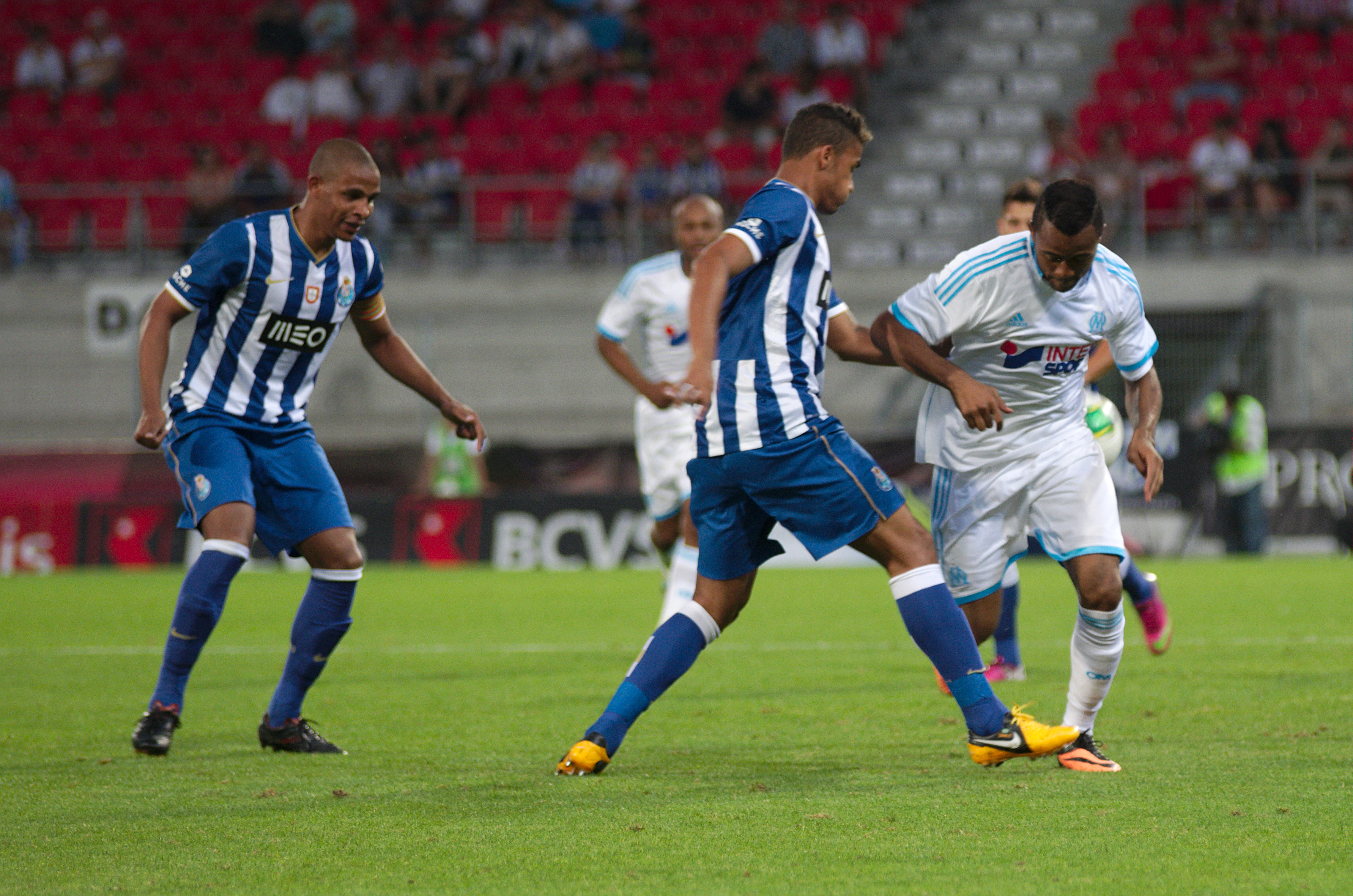 Valais Cup 2013 - OM-FC Porto - 20130713 - Fernando, Danilo et Jordan Ayew